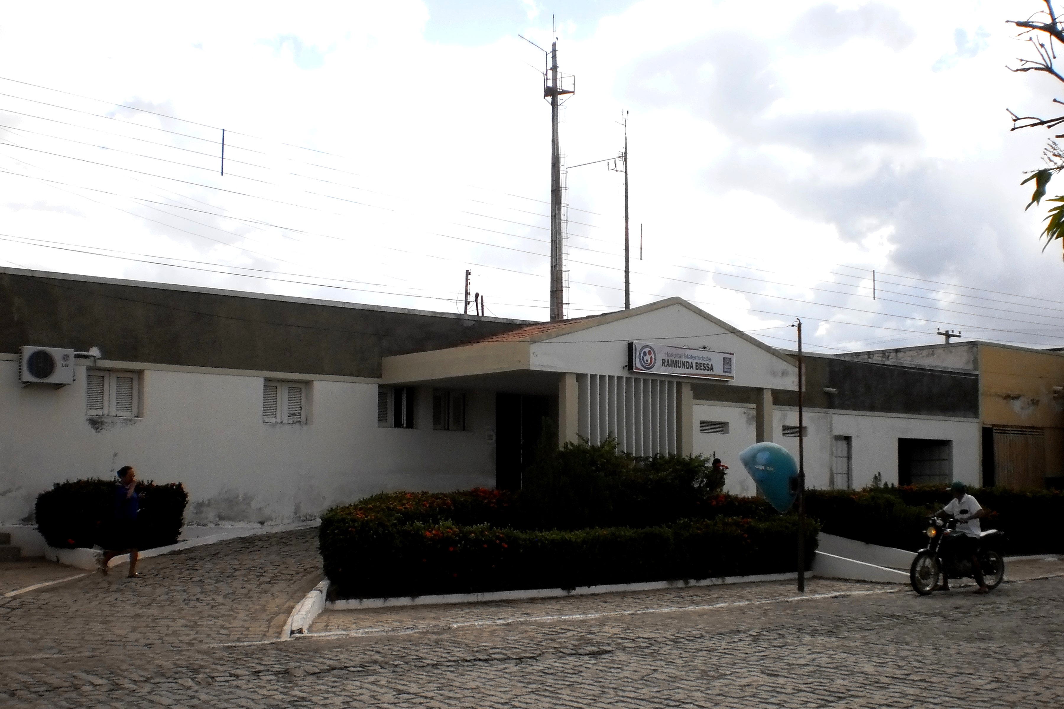 Hospital Maternidade Raimunda Bessa em Taboleiro Grande, Rio Grande do Norte (Brasil)